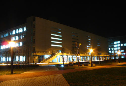 華中農業大學第三教學樓